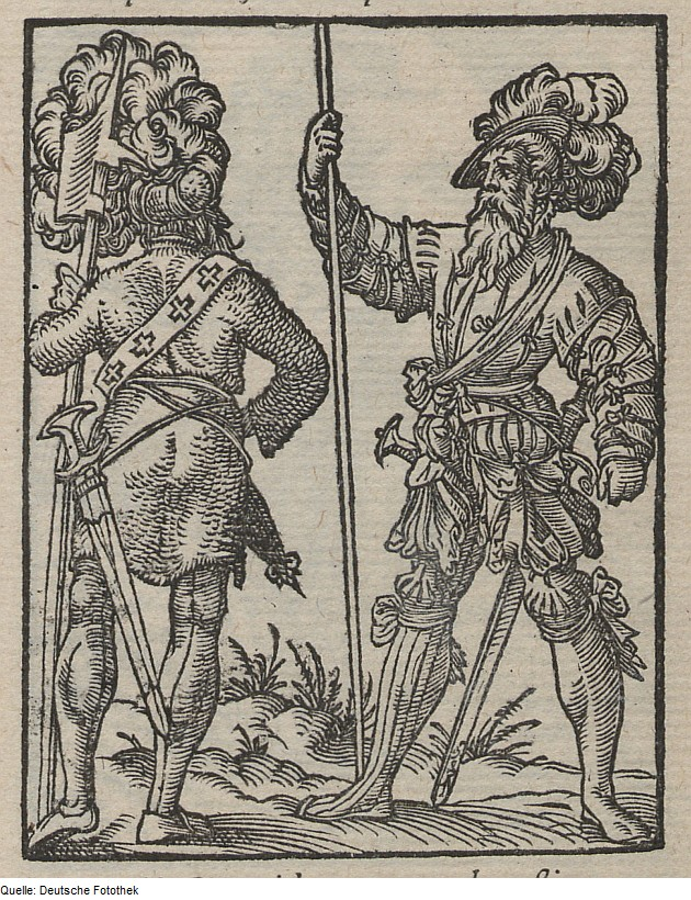 Original image description from the Deutsche Fotothek Ständebuch & Amt & Militär & Trabant & Gardist & Gefolge